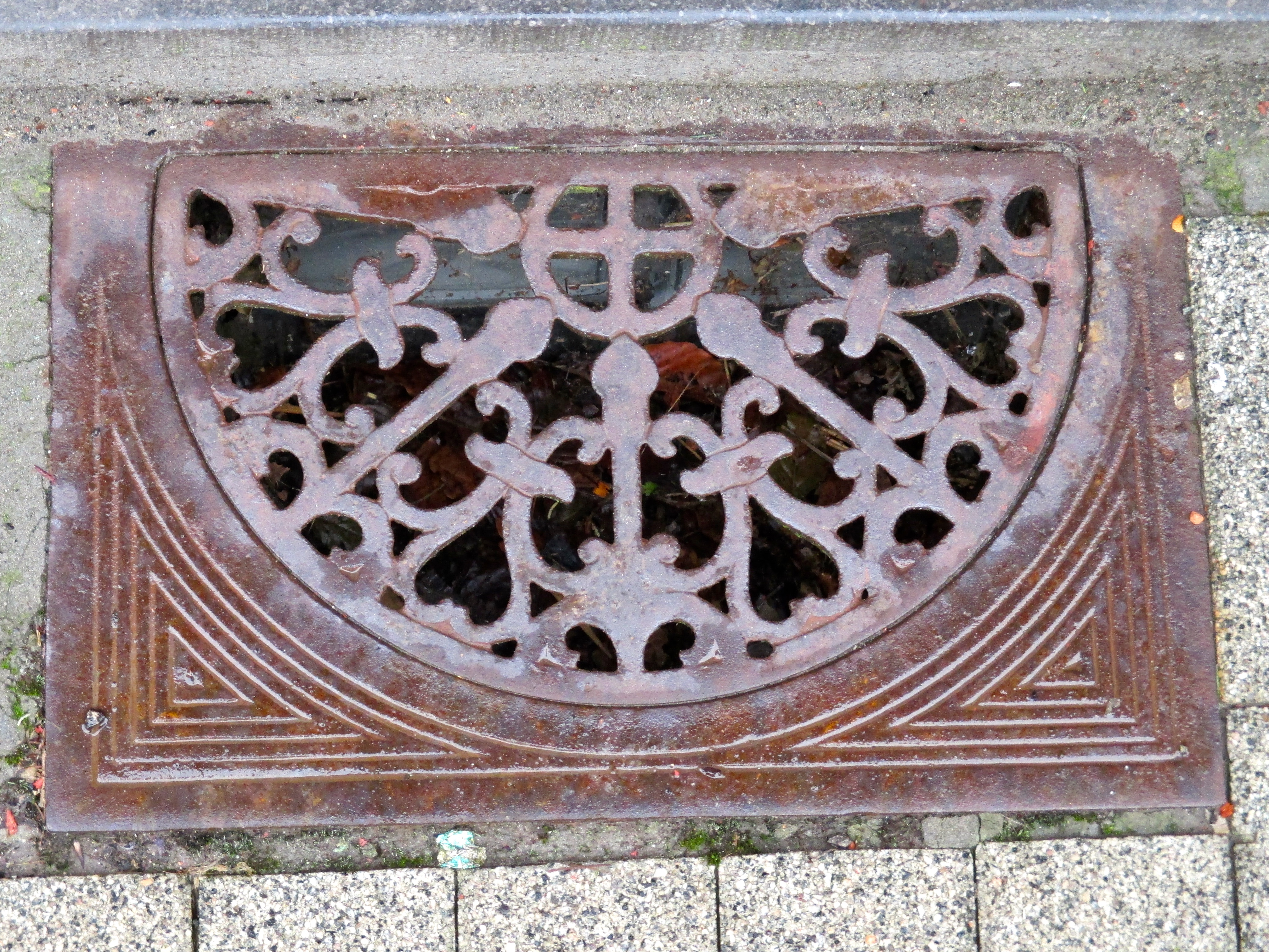 Fonte de voirie, soupirail